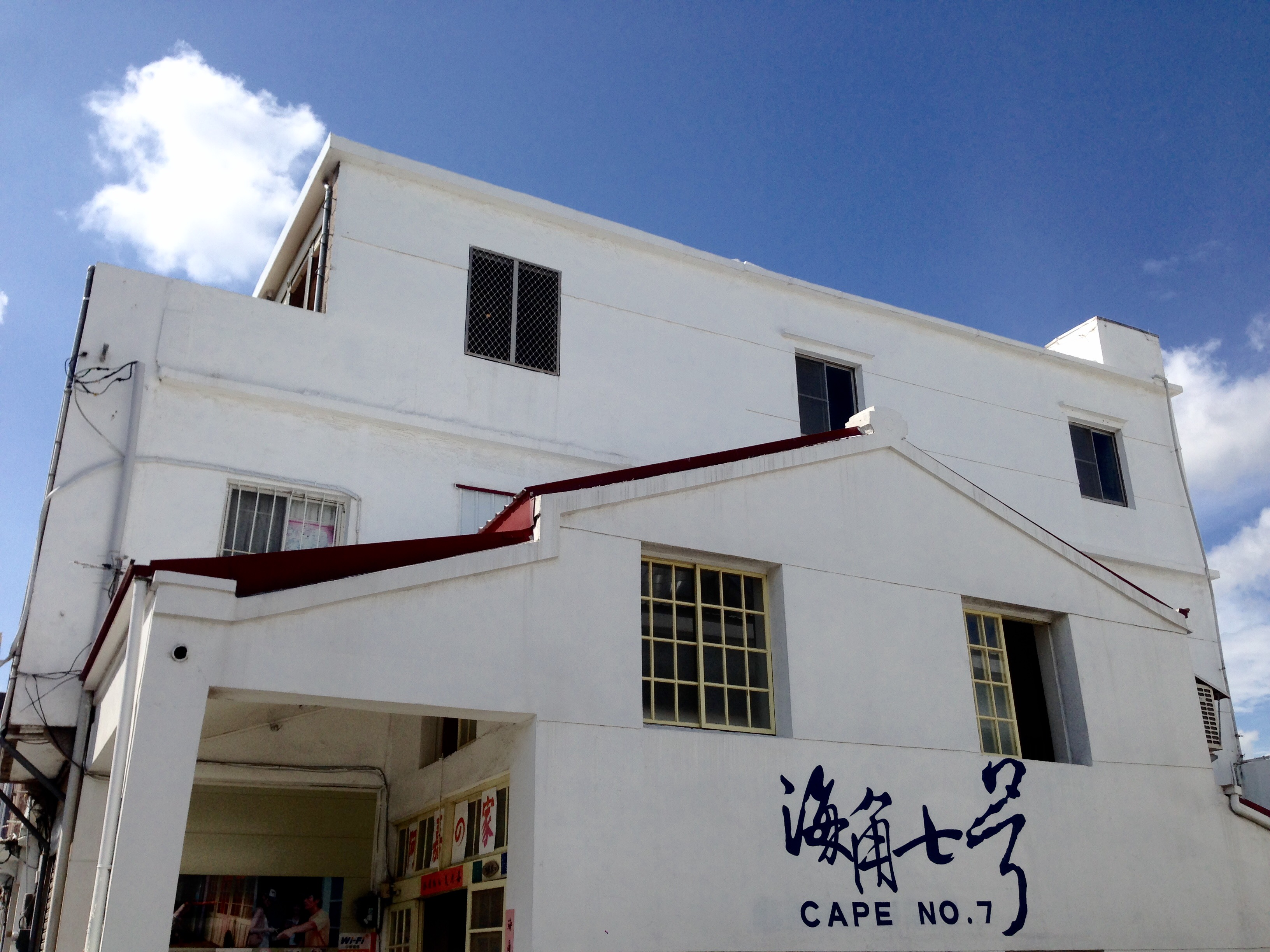 中文（台灣）: 《海角七號》阿嘉的家